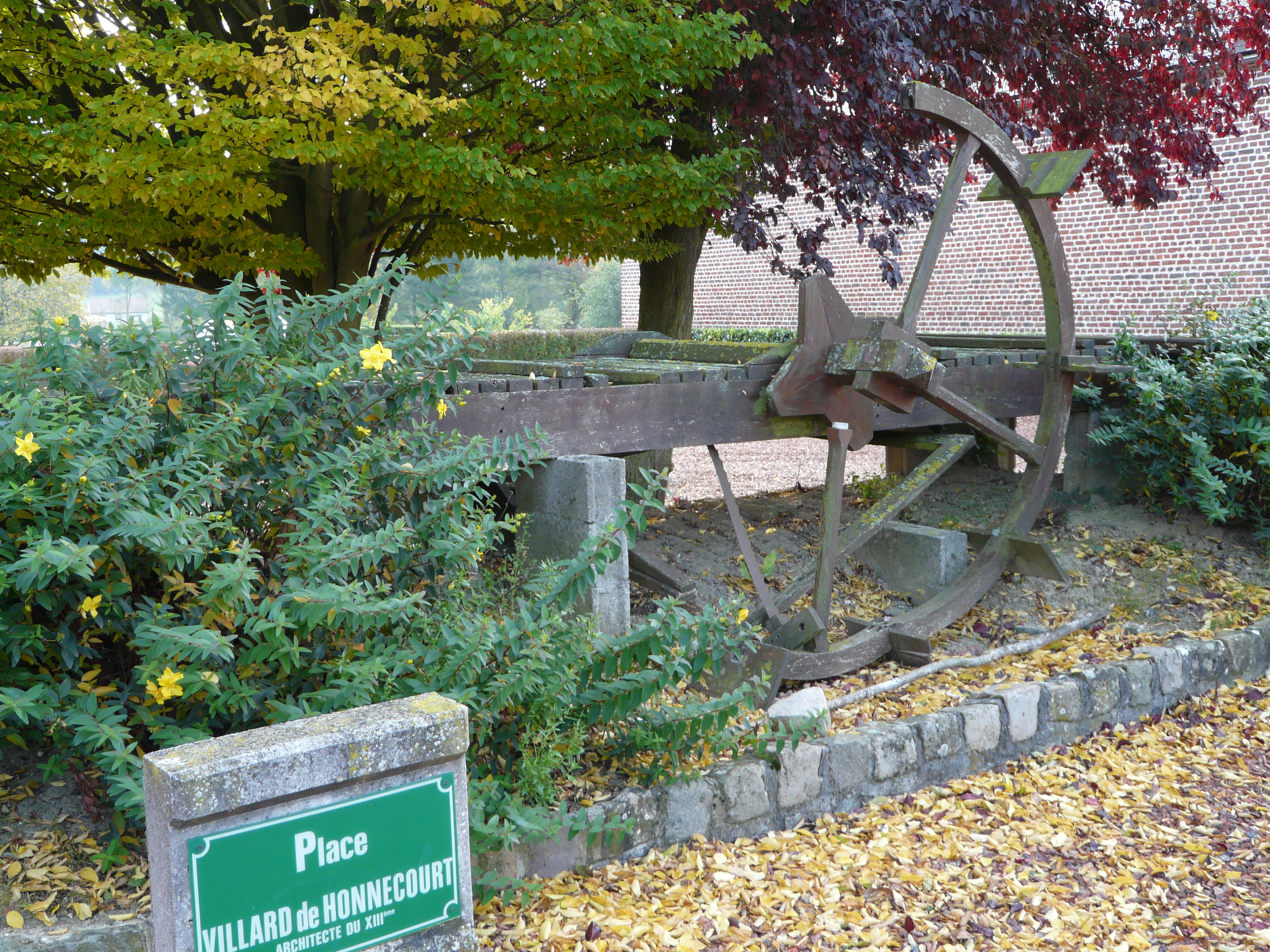 Reconstitution d'une scie à bois selon des plans de Villard de Honnecourt à Honnecourt-sur-Escaut (Nord, France) : état en octobre 2011